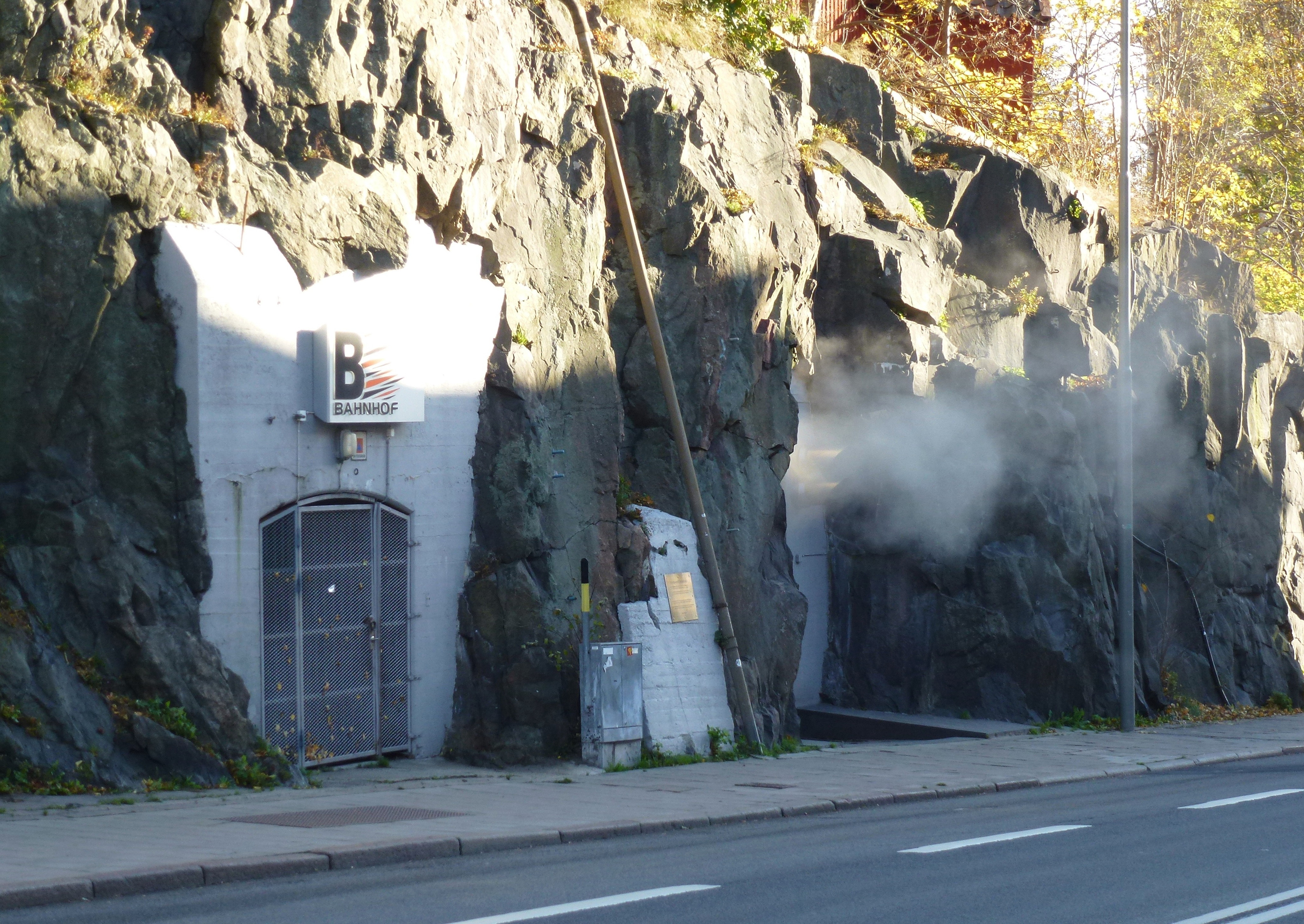 Pionen, tidigare skyddsrum och ledningscentral, numera plats för Bahnhofs datahall